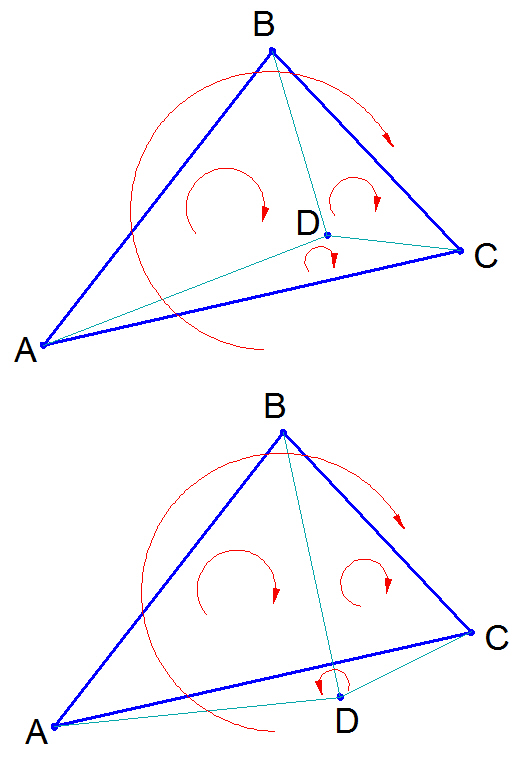 Trojúhelník_ABC-D